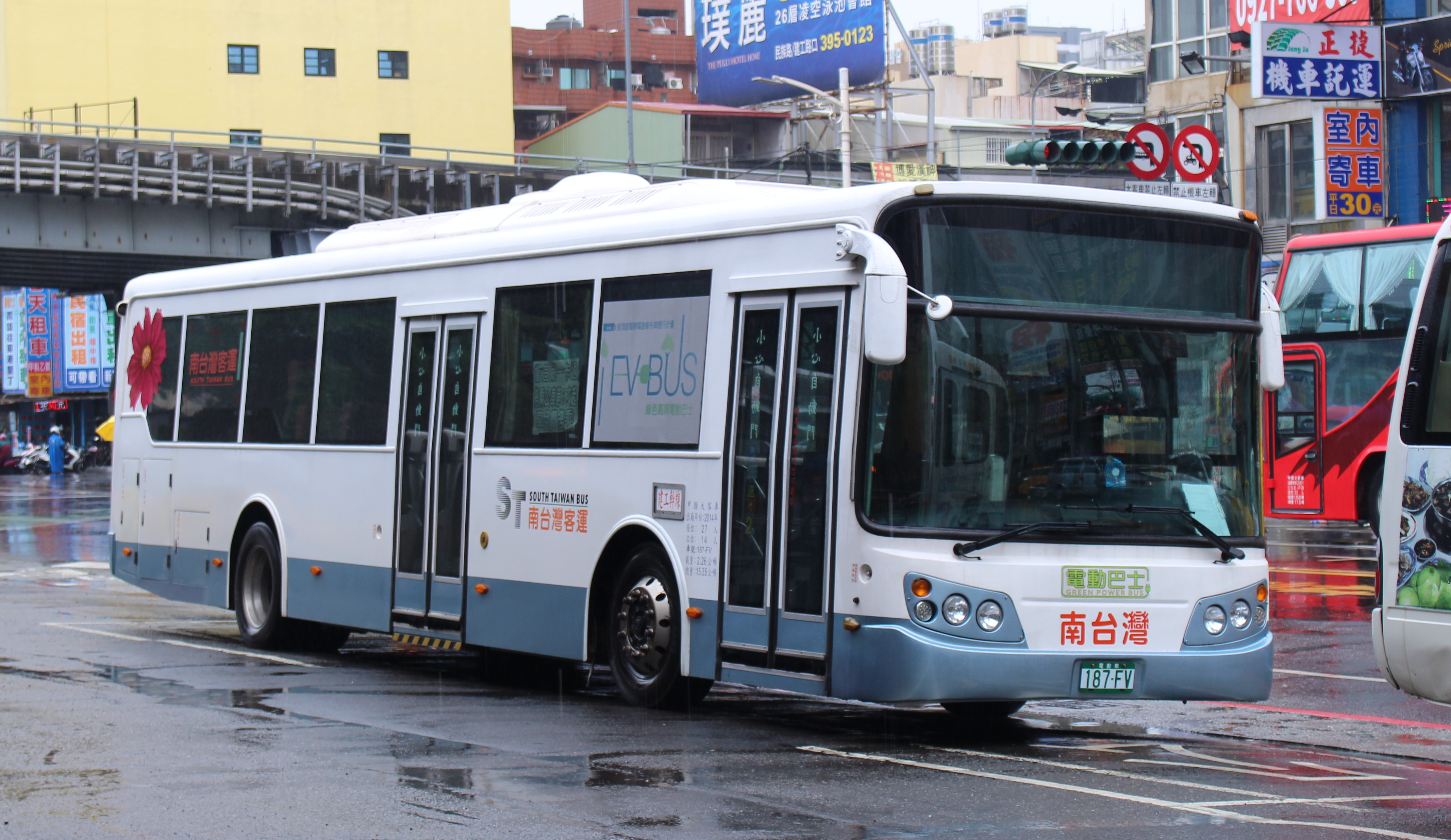 南台灣客運華德動能科技RAC12LB150電動低地板公車187-FV。